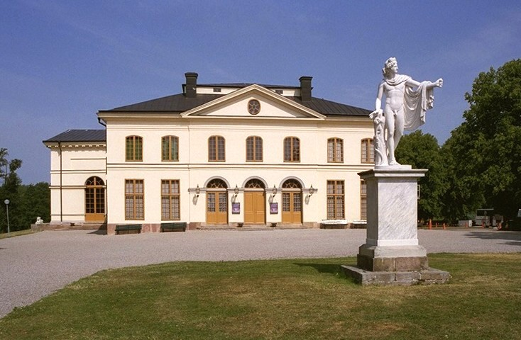 Den Drottlinghamtheater.